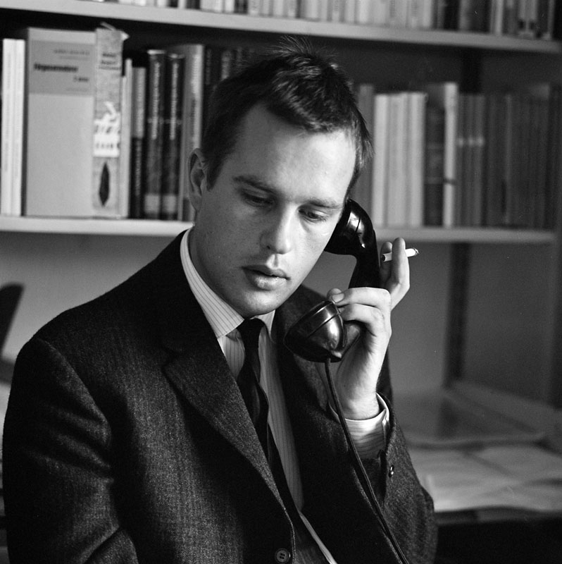 Författaren Jörn Donner hos Bonniers förlag (Sveavägen 56) år 1962.